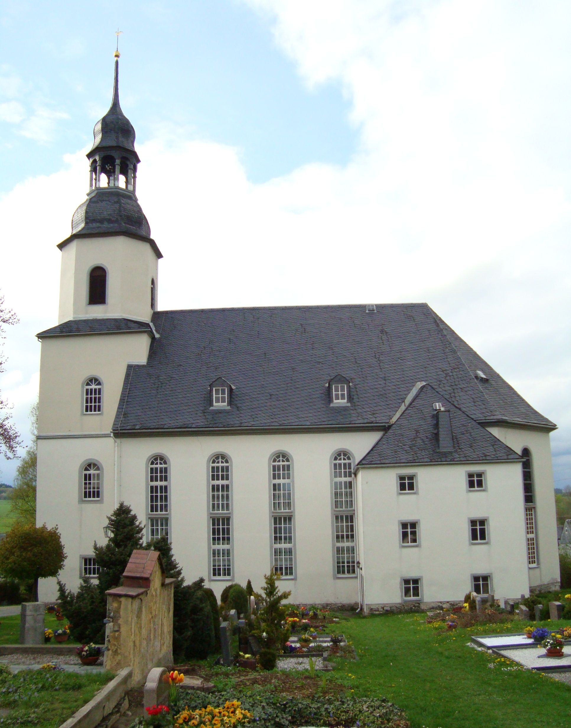 Johanneskirche in Niederzwönitz im Erzgebirge